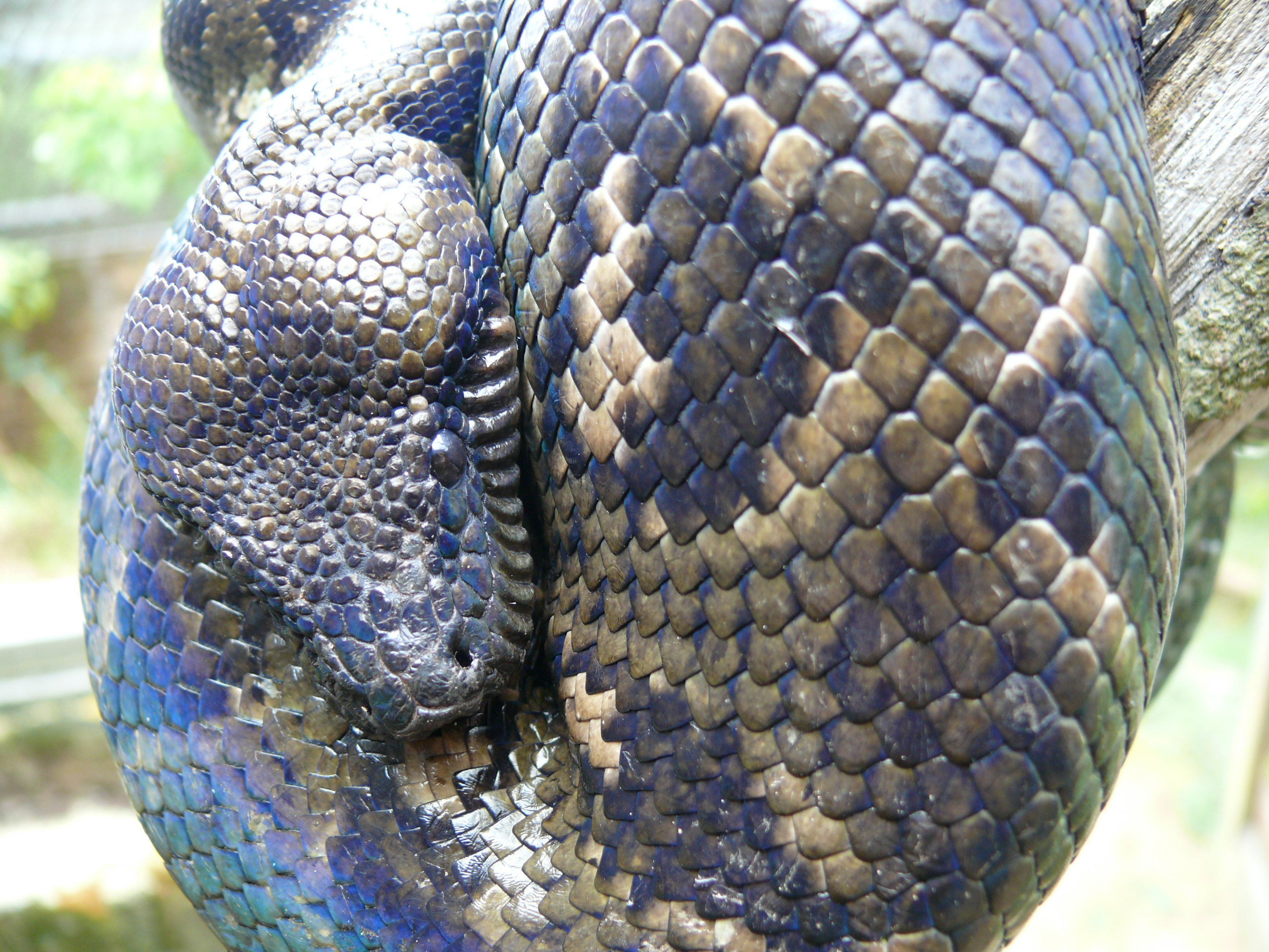 Boa Malgache